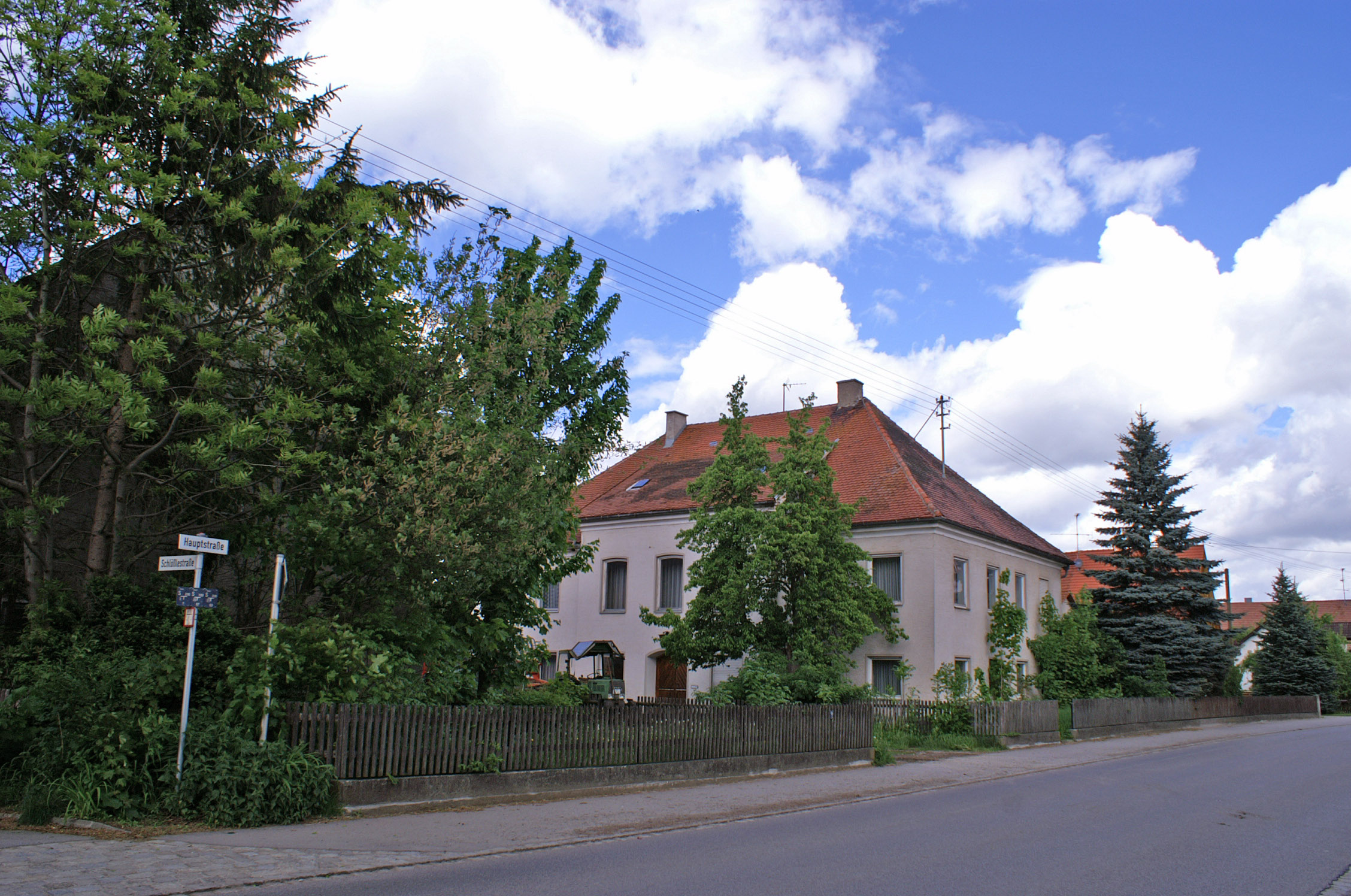 Ehem. Schloss in Lamerdingen